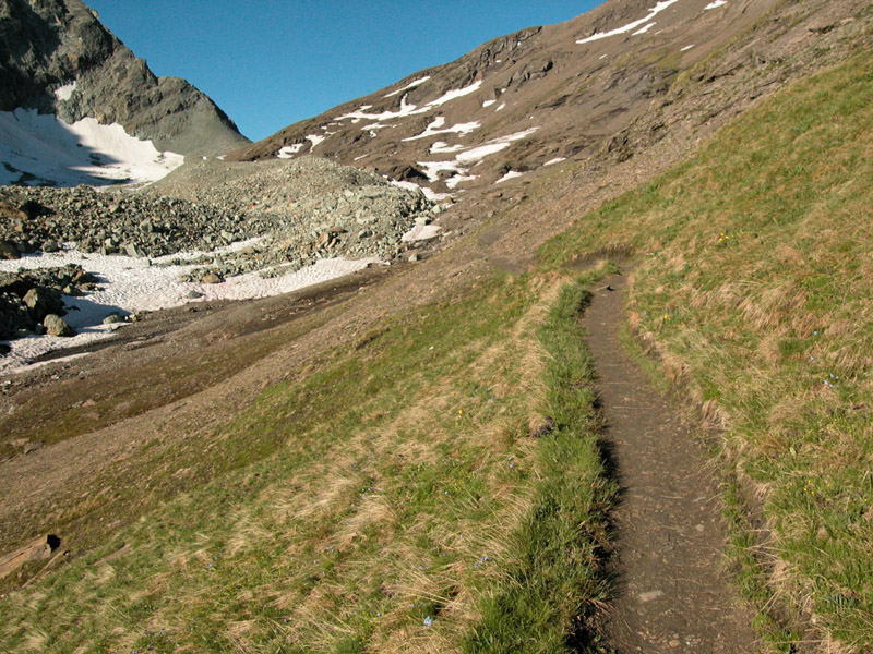 montée à la fenêtre Durand